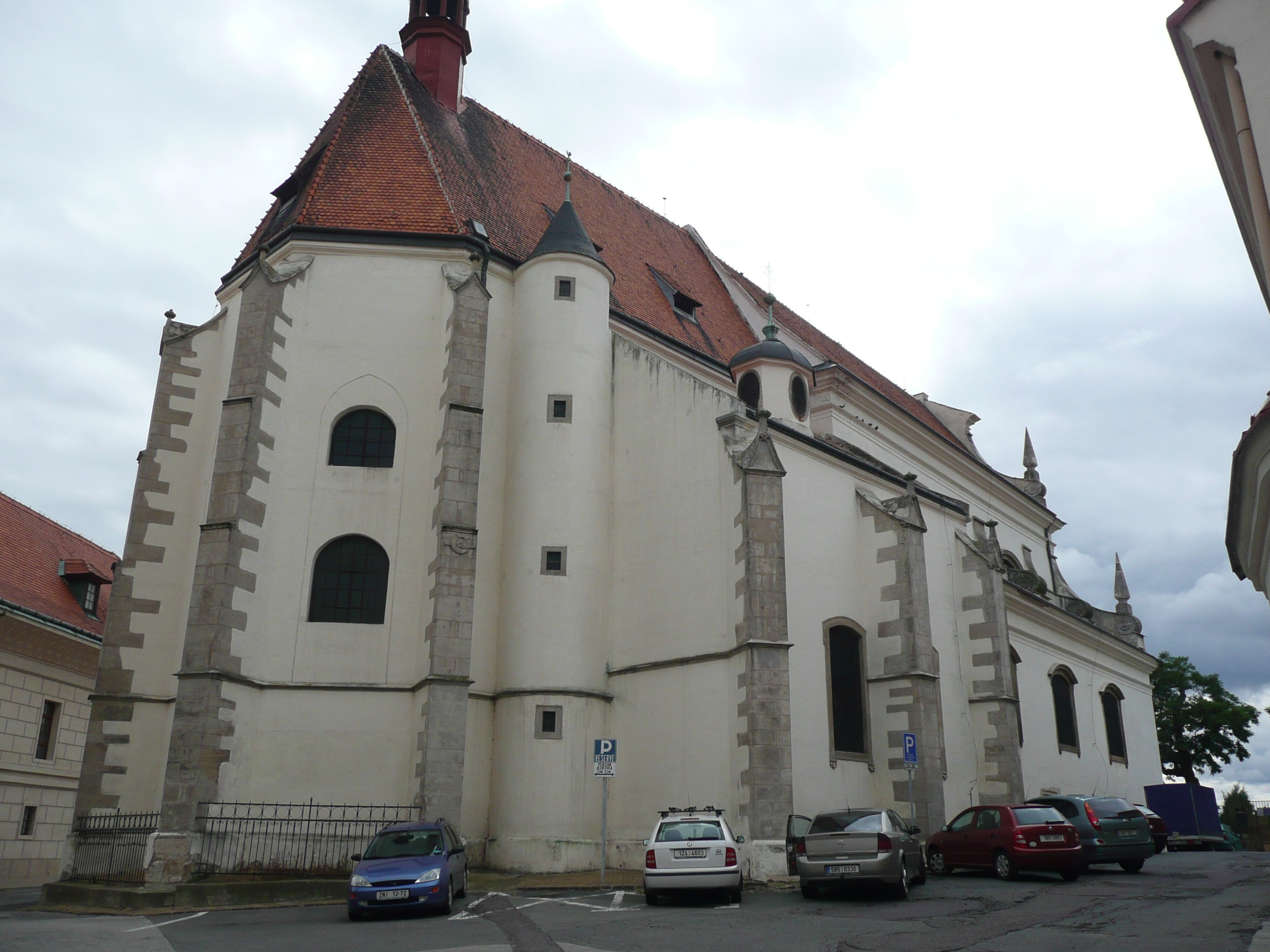 Kostel svatého Michala (Znojmo), závěr presbytáře.